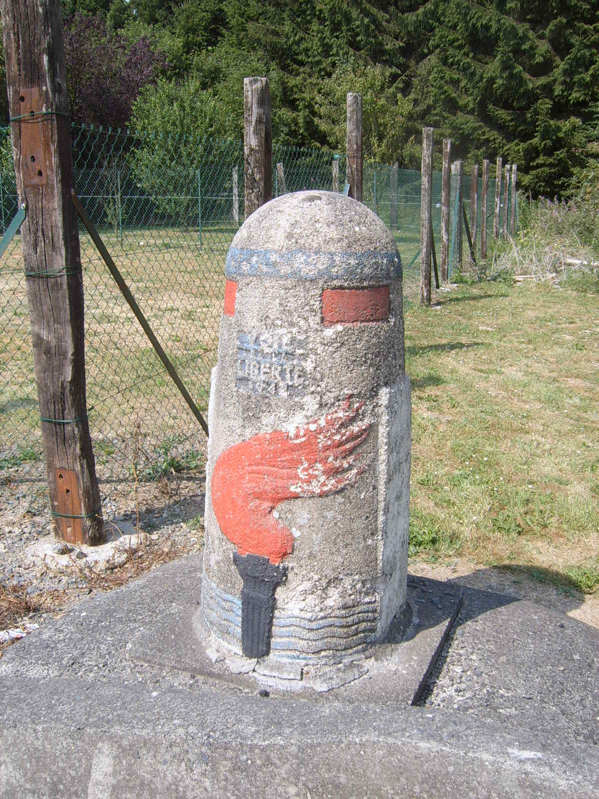 Voie de la Liberté, Bastogne. Personal picture, I set it in public domain. Bel Adone 22 juillet 2006 à 13:34 (CEST)